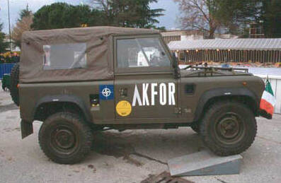 Landrover defender Ar90 dell'Esercito Italiano